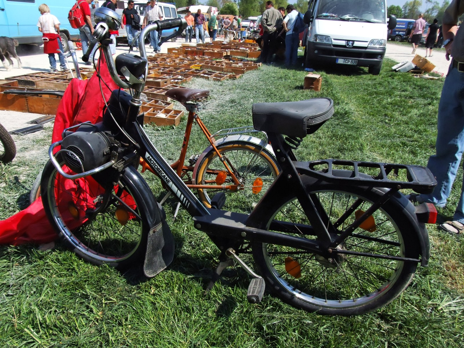 Velosolex S3800 export